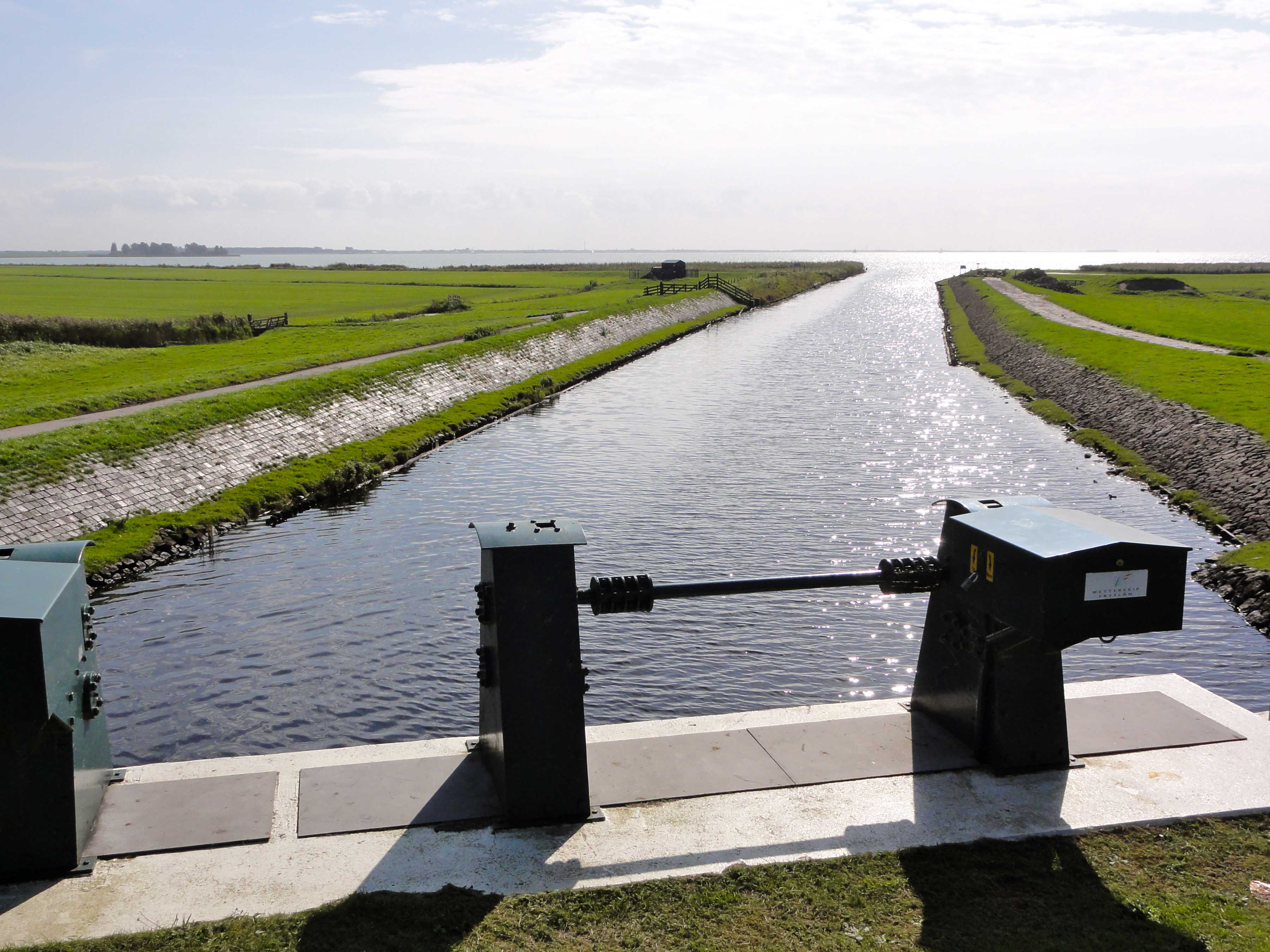 De Ee bij Tacozijl en het IJsselmeer